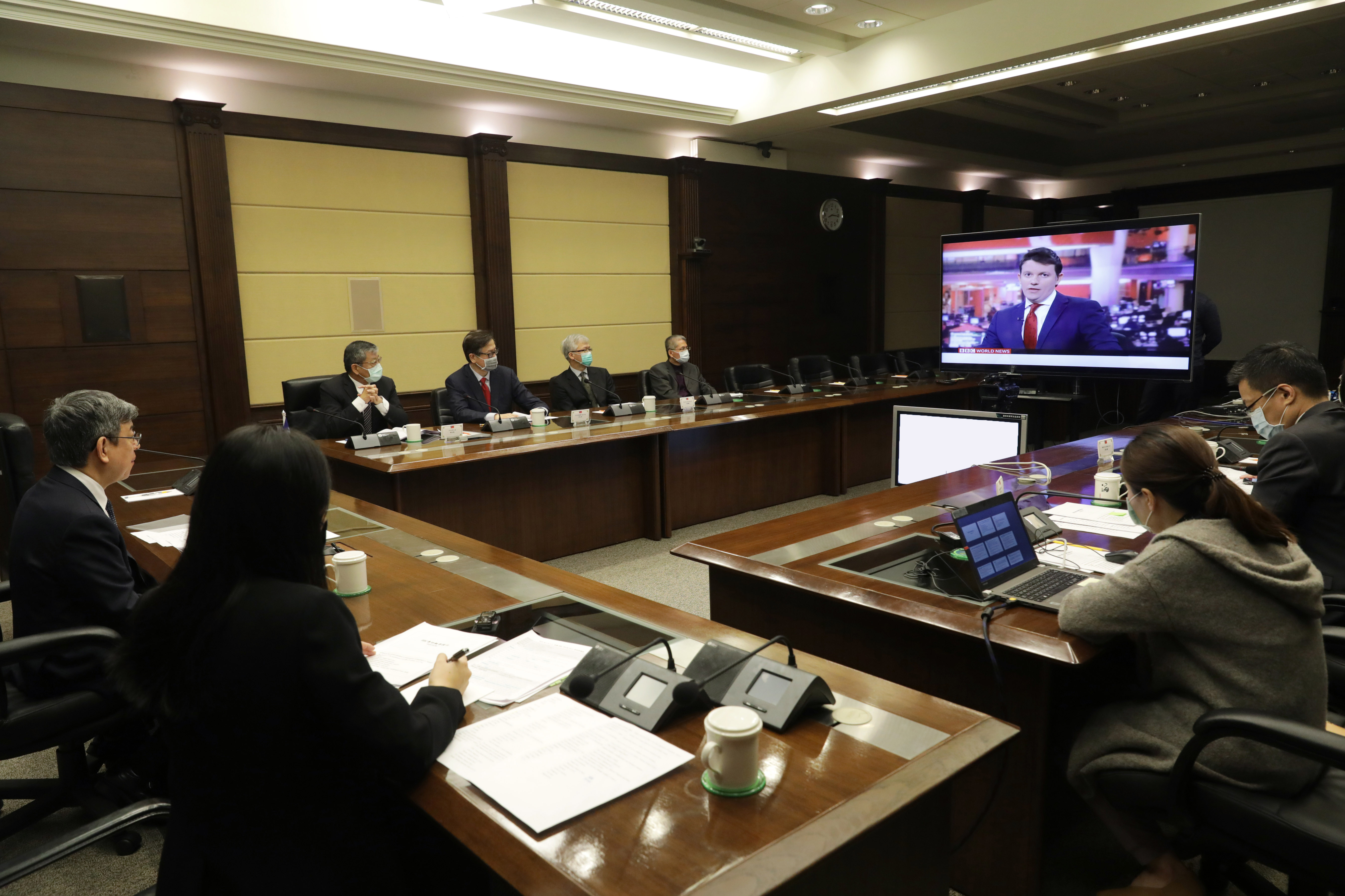 中華民國副總統陳建仁接受英國廣播公司世界新聞頻道專訪